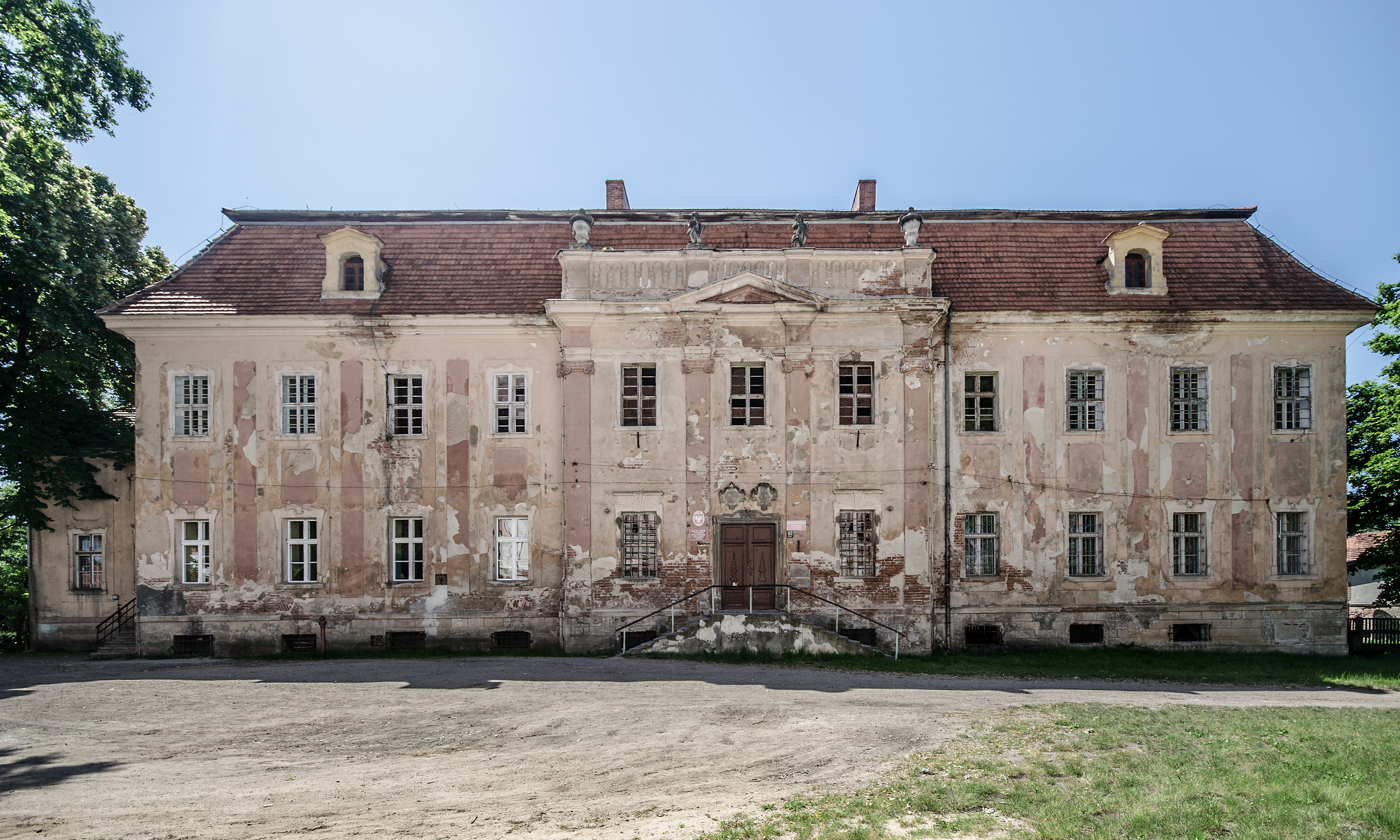 Siciny, pałac (d. prepozytura cystersów z Lubiąża), XVIII